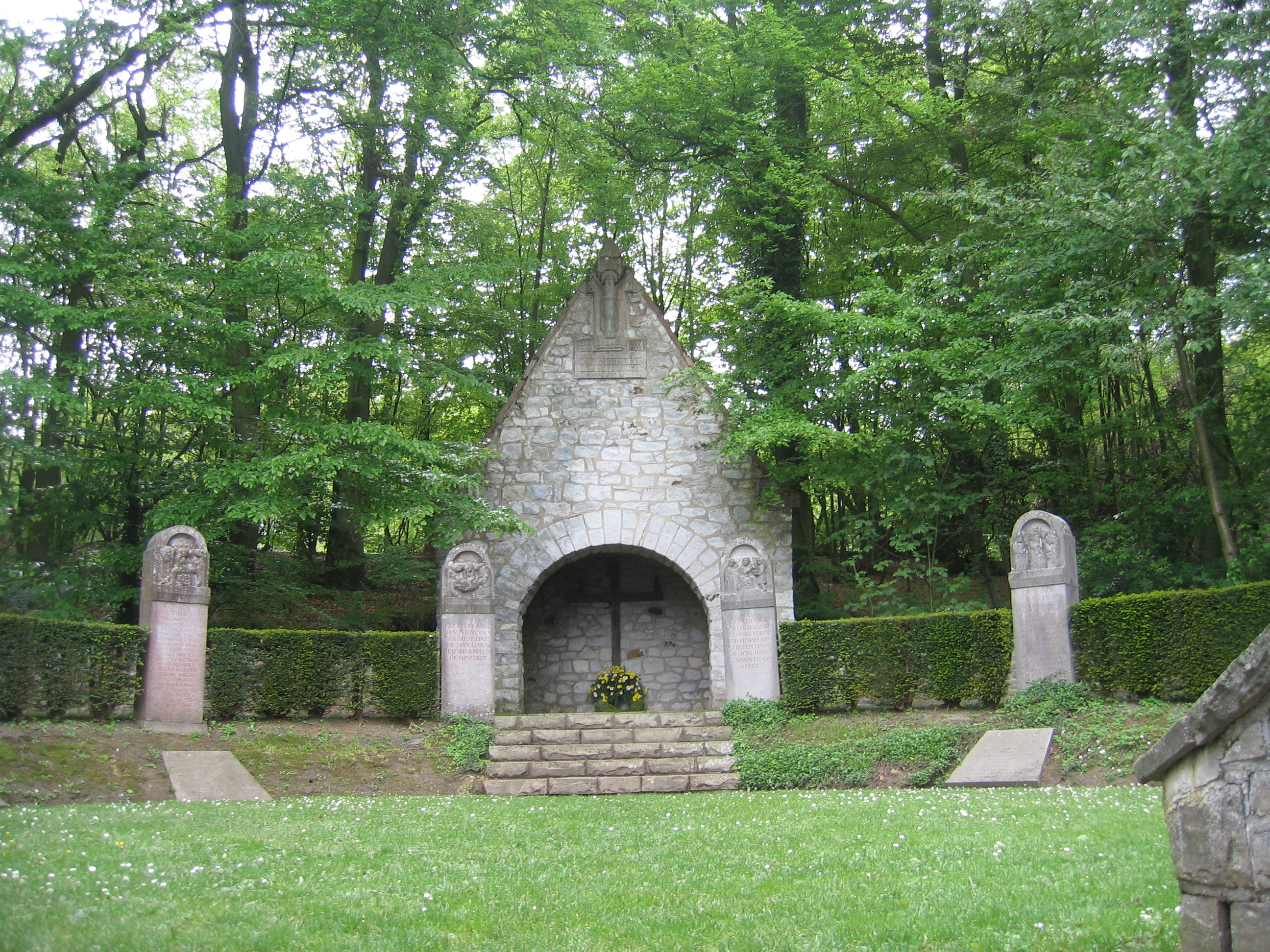 Kriegerdenkmal Wachtberg